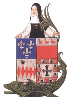 het bij Koninklijk Besluit van 29 augustus 1842 aan Zandhoven toegekende gemeentewapen. Schildhouder is een Sint-Amelberga van natuurlijke kleur, staande op een steur van sinopel.